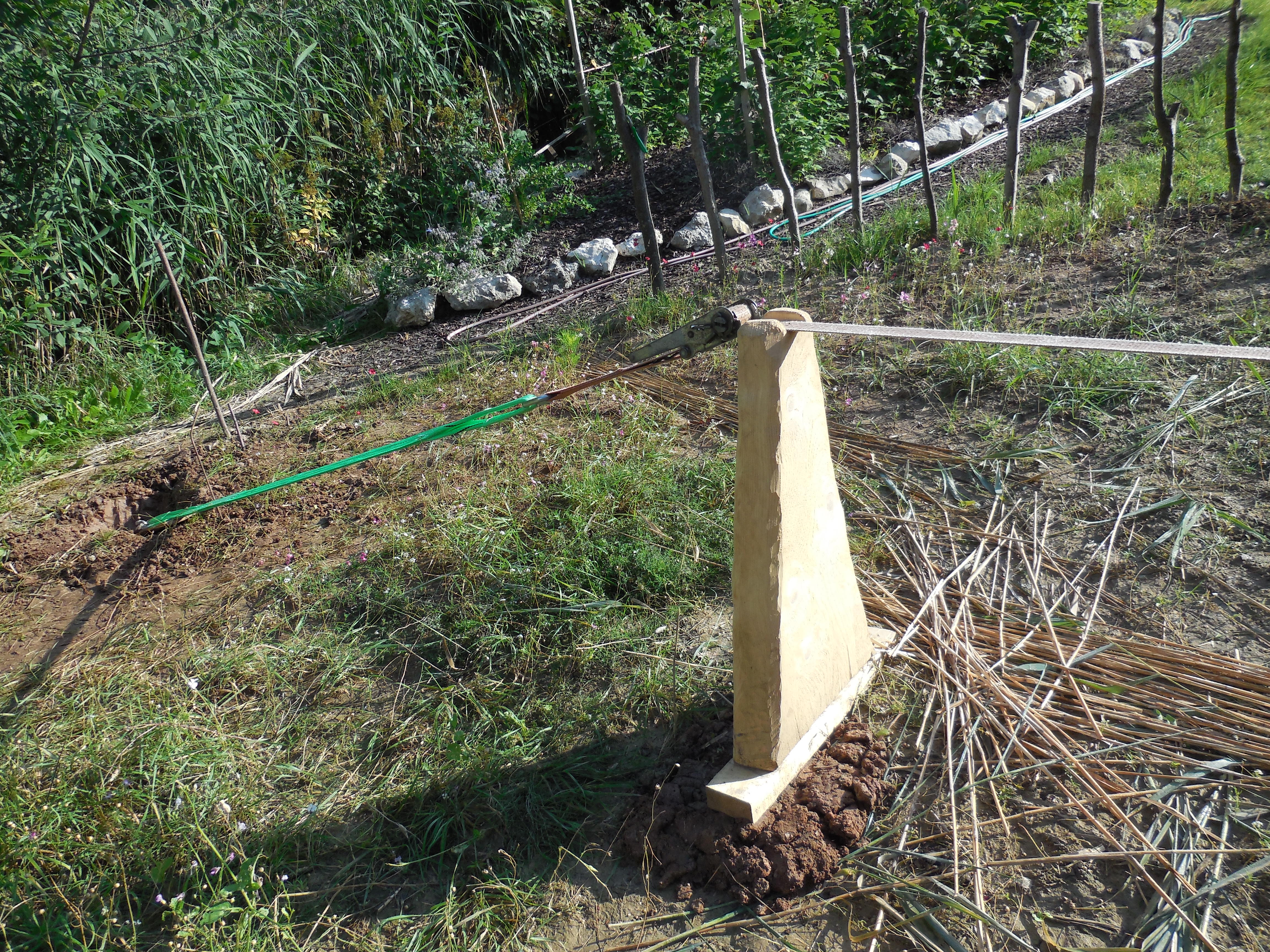 Stütze zur Abspannung einer Slackline am Boden. Baumscheibe aus Sägewerk (Anschnitt am Stamm), grob behauen, mit Seilaufnahme am oberen Ende. 70cm hoch, unten 40cm breit, oben 10cm breit, 8cm dick.